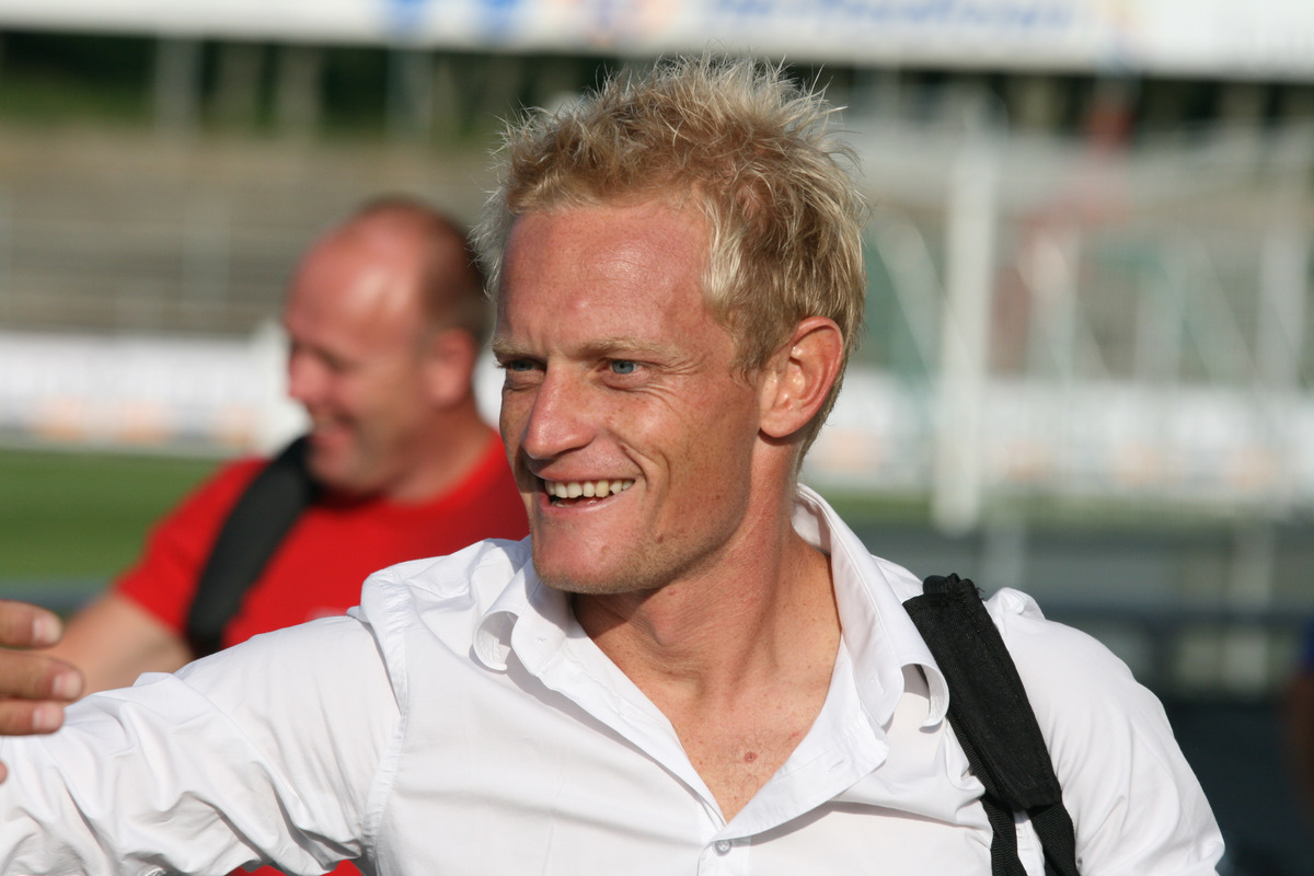 Martin Jensen, Sandefjord